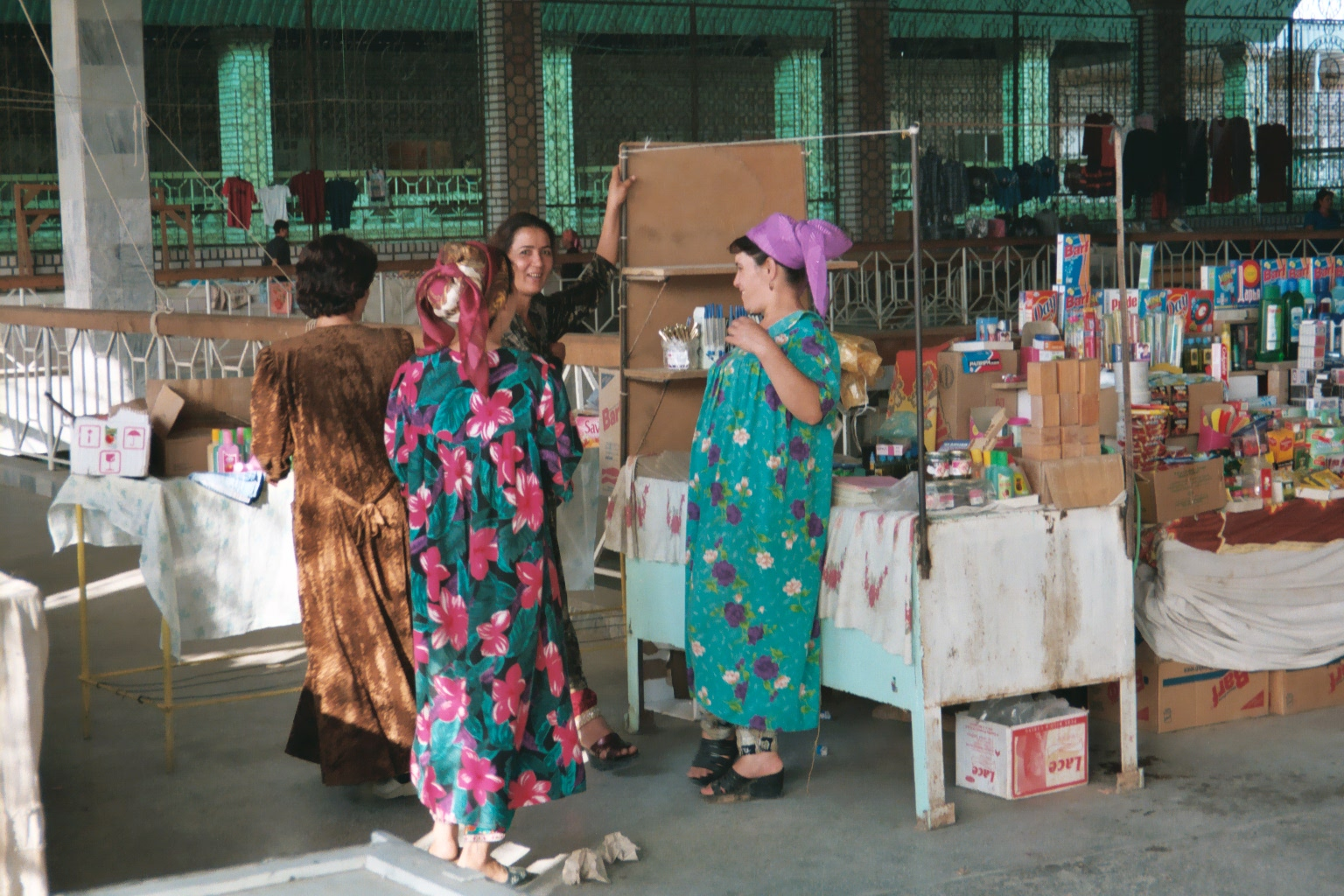 stallholders in Termiz market, Uzbekistan